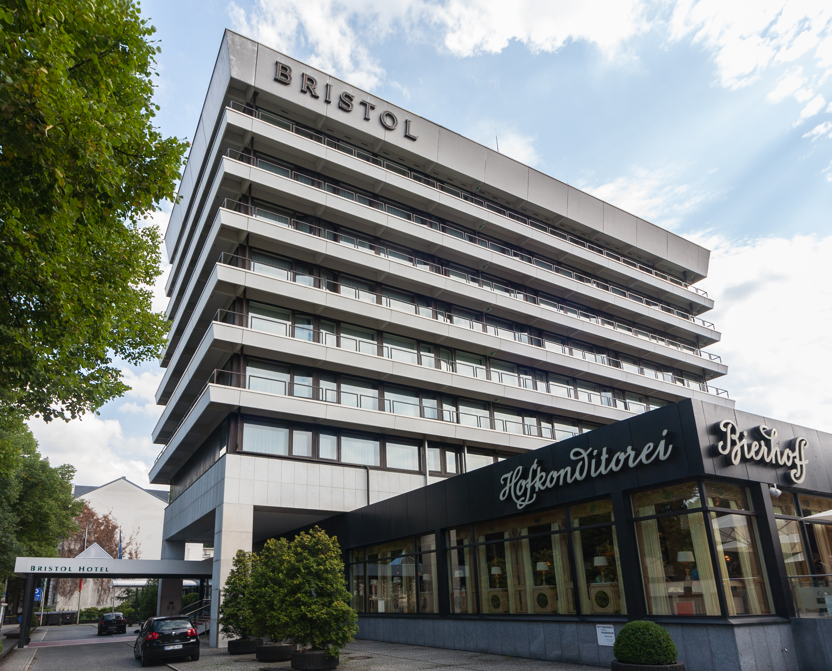 Hotel Bristol, Prinz-Albert-Straße 2, Bonn-Südstadt